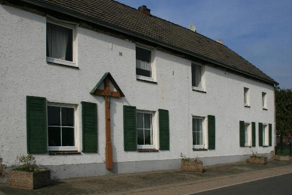 Haus mit Wegekreuz in Wegberg-Petersholz